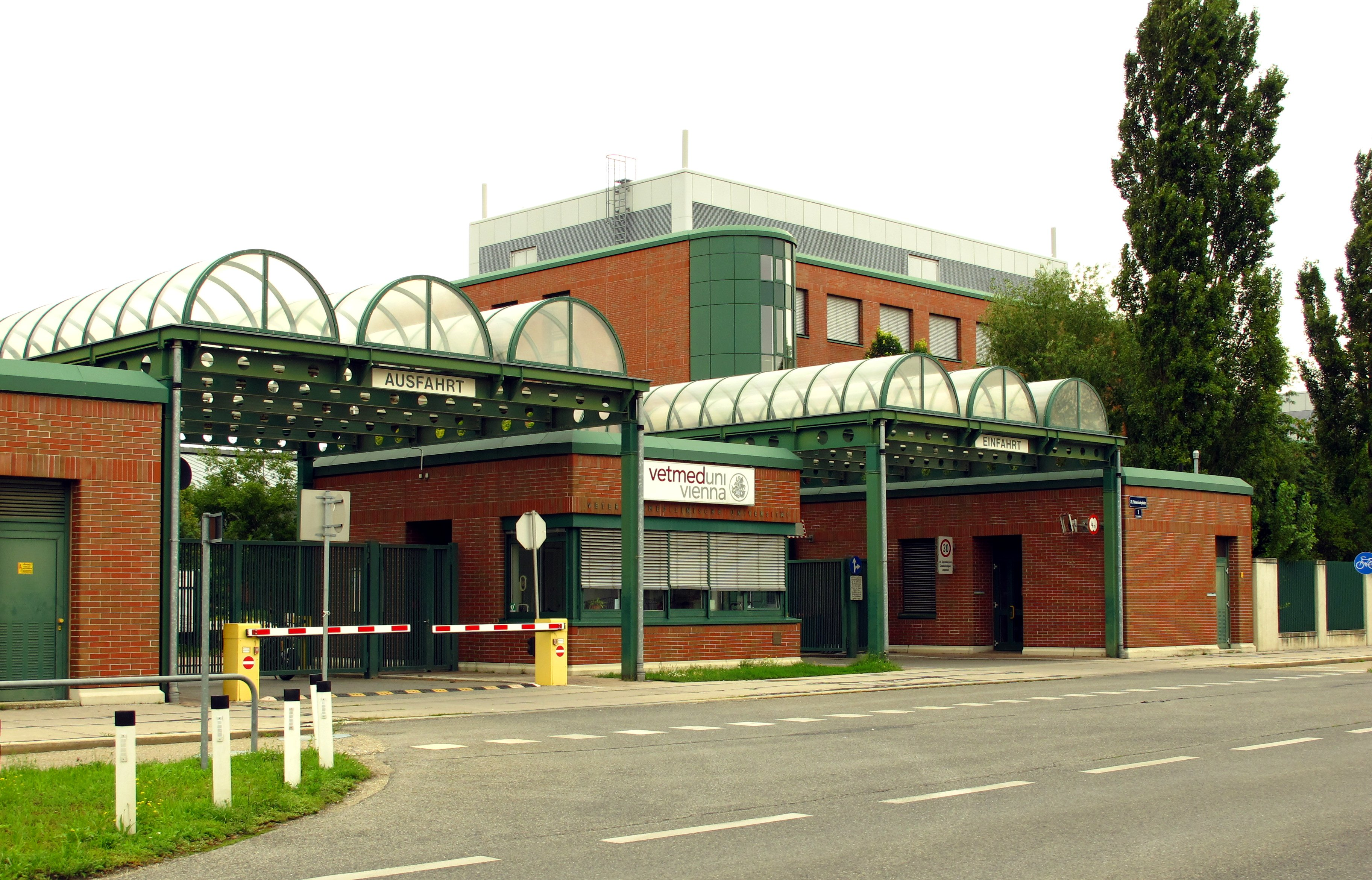 Veterinärmedizinische Universität Wien